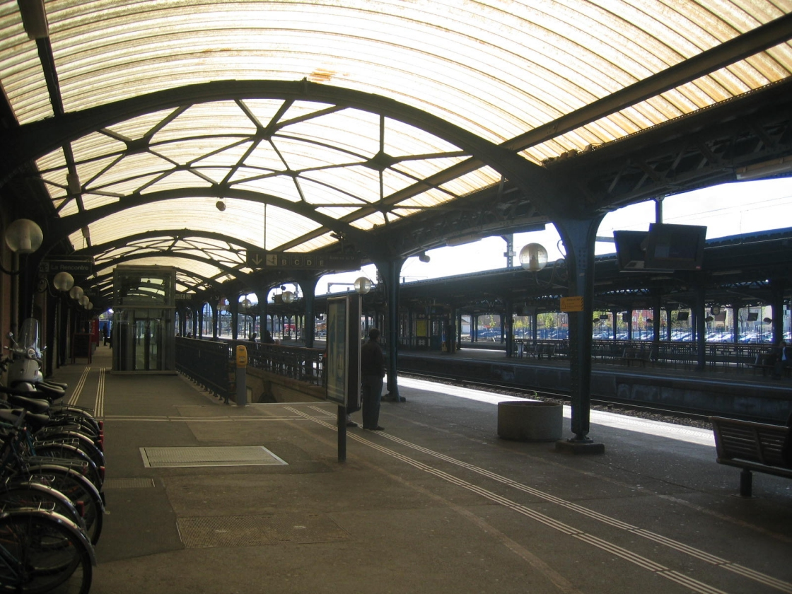 Une partie des quai de la gare de Colmar